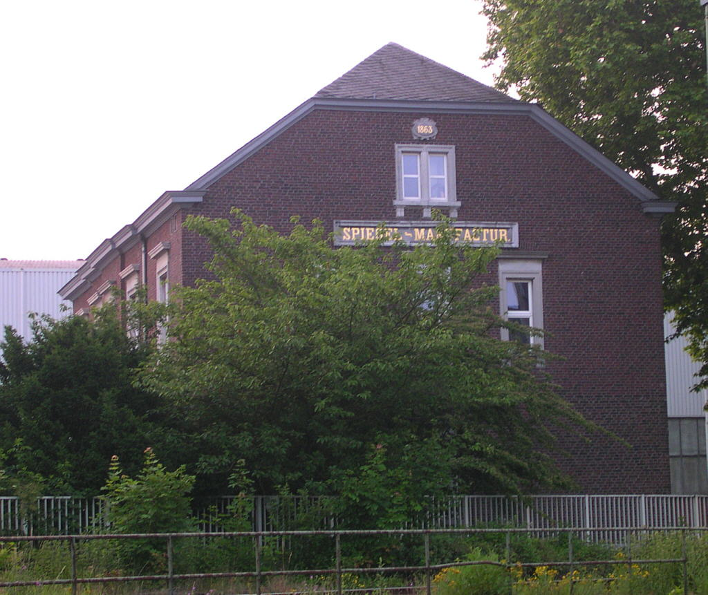 Stolberg, Spiegelmanufaktur von 1863 (Stammsitz der Vereinigten Glaswerke)